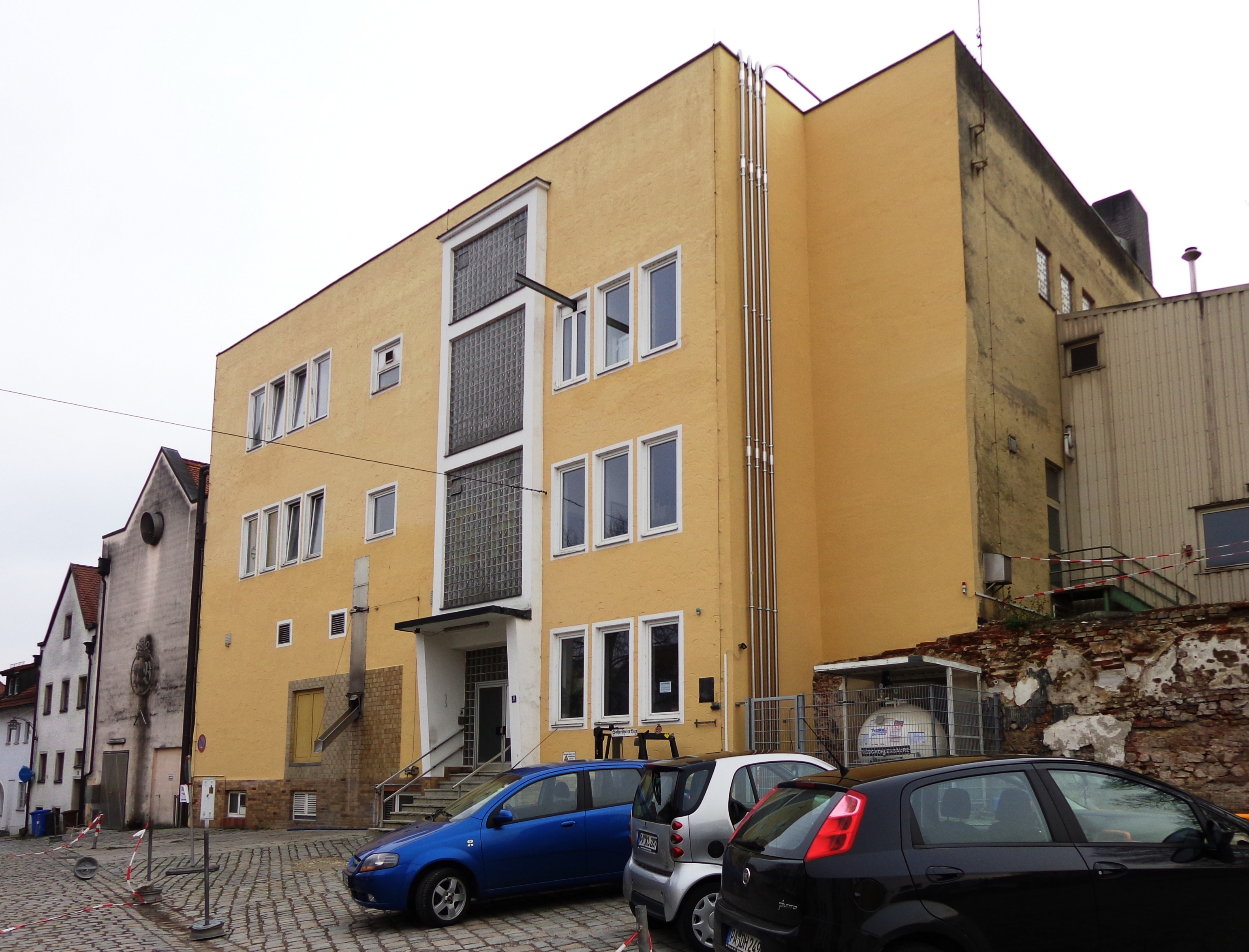 Brauereigebäude der Brauerei "Wolferstetter" in Vilshofen a.d. Donau.